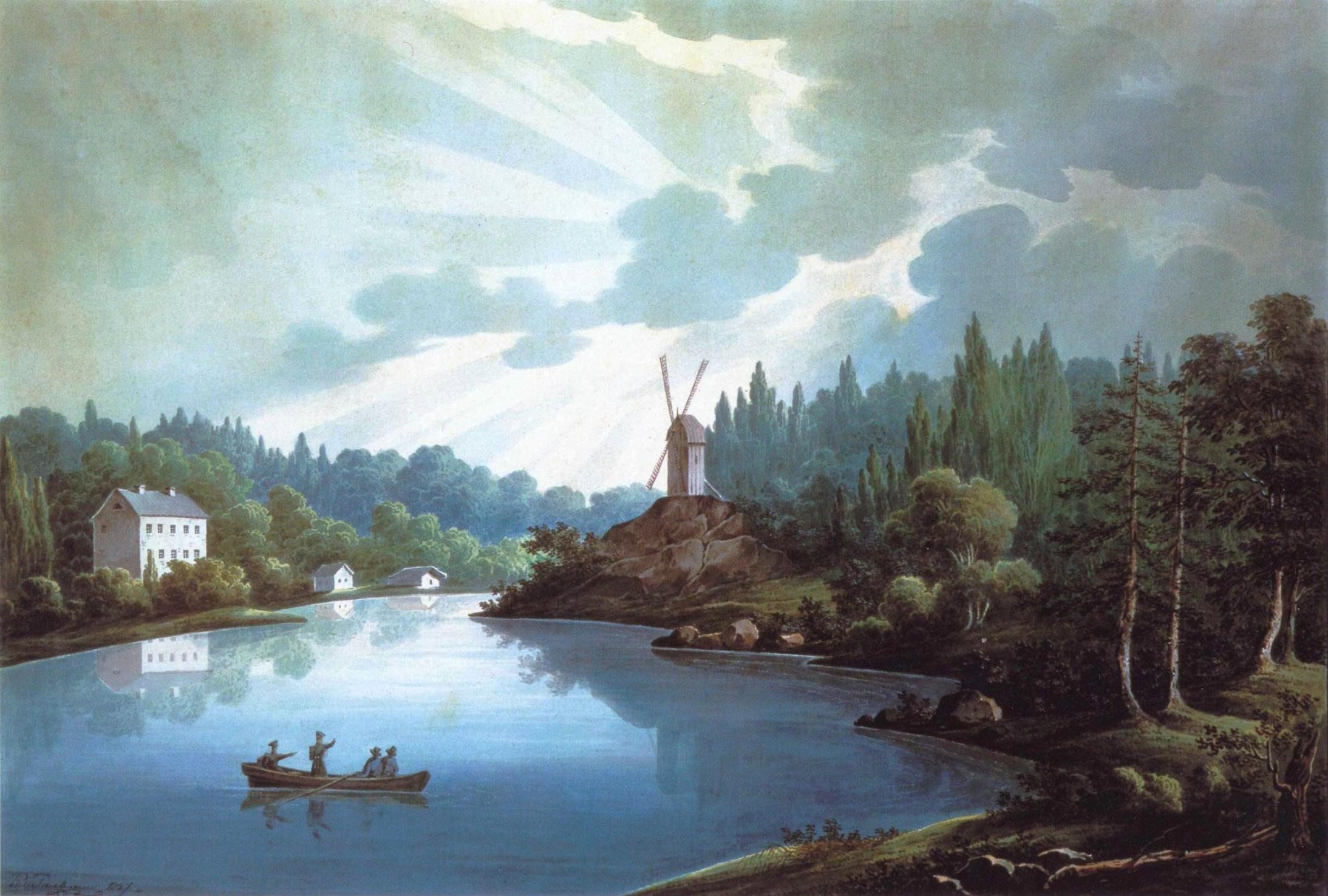 Herttoniemen salmi silloisessa Helsingin pitäjässä, vasemmalla Herttoniemeä, oikealla Laajasaloa tai Tammisaloa. Rakennukset vasemmalla liittyvät Herttoniemen kartanon mailla toimineeseen saviastia- ja kaakelitehtaaseen. Teoksen omistaa Helsingin kaupunginmuseo.